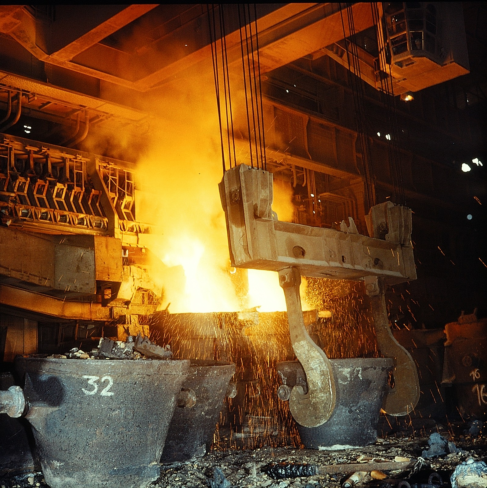 VEB Rohrkombinat Stahl- und Walzwerk Riesa, Ausbildungsberufe: Metallurge für Hüttentechnik